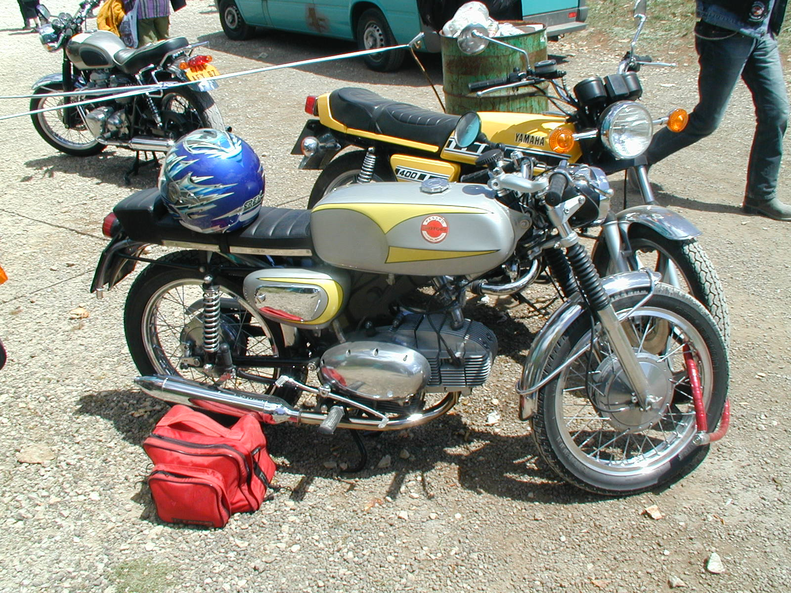 MotoBi 250 Sport Special del 1970 Picture : Gérard Delafond